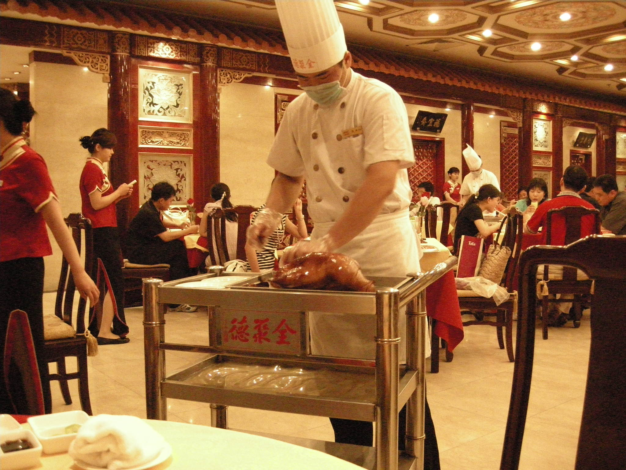 Quanjude Duck Restaurant